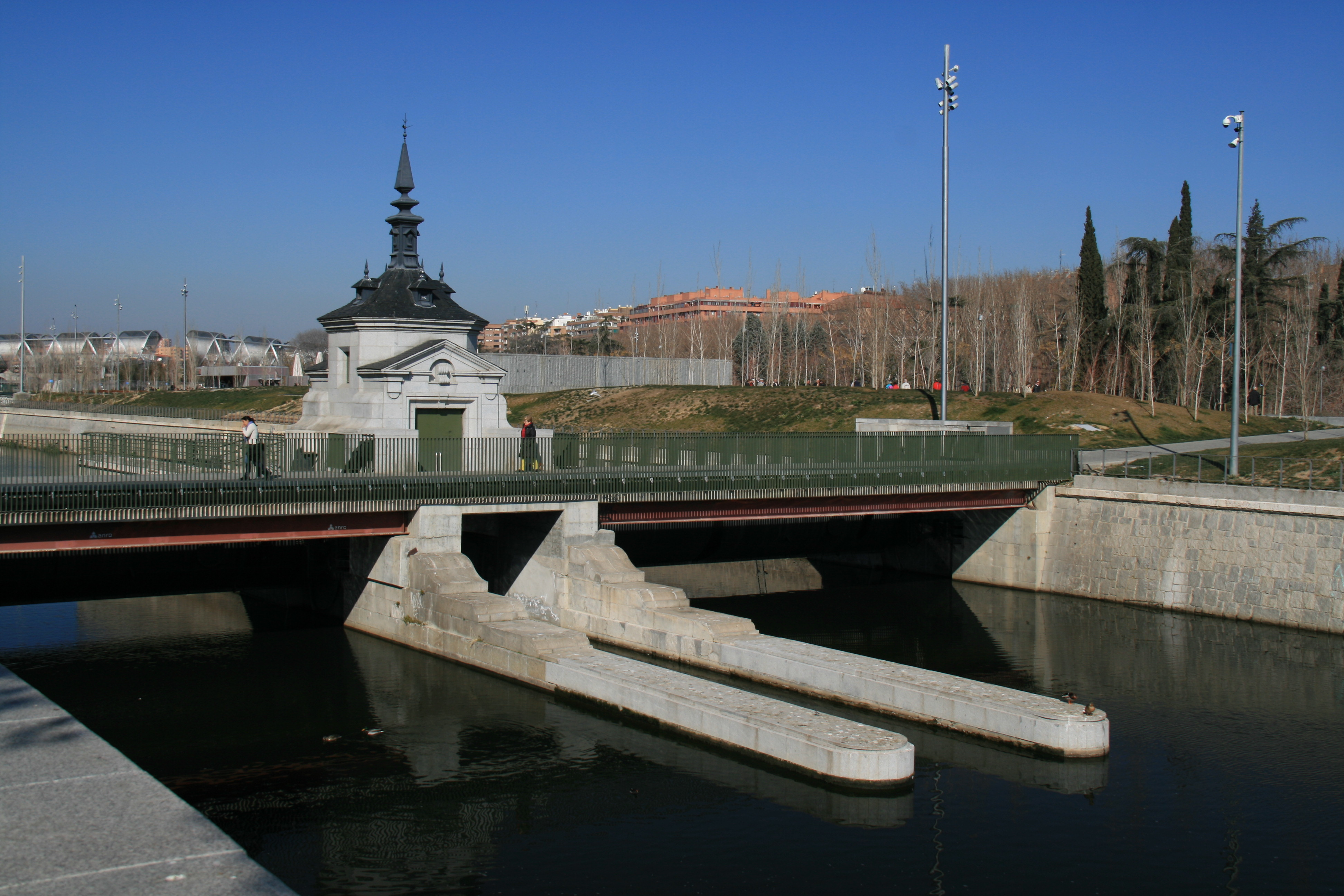 Esclusa - Manzanares -01